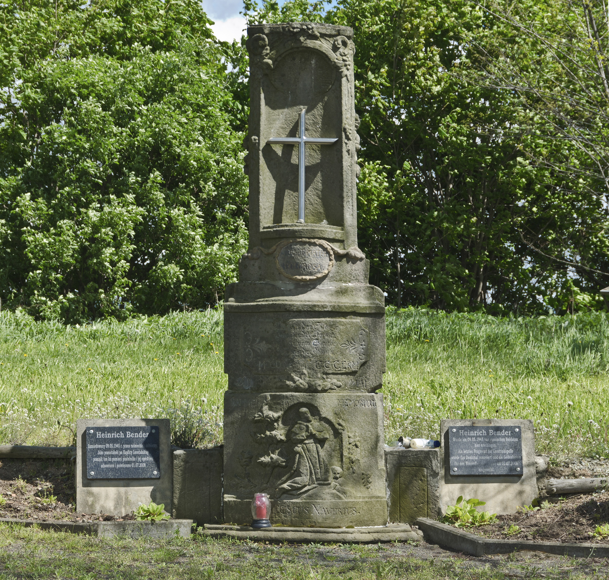 Bożków, pomnik Heinricha Bendera